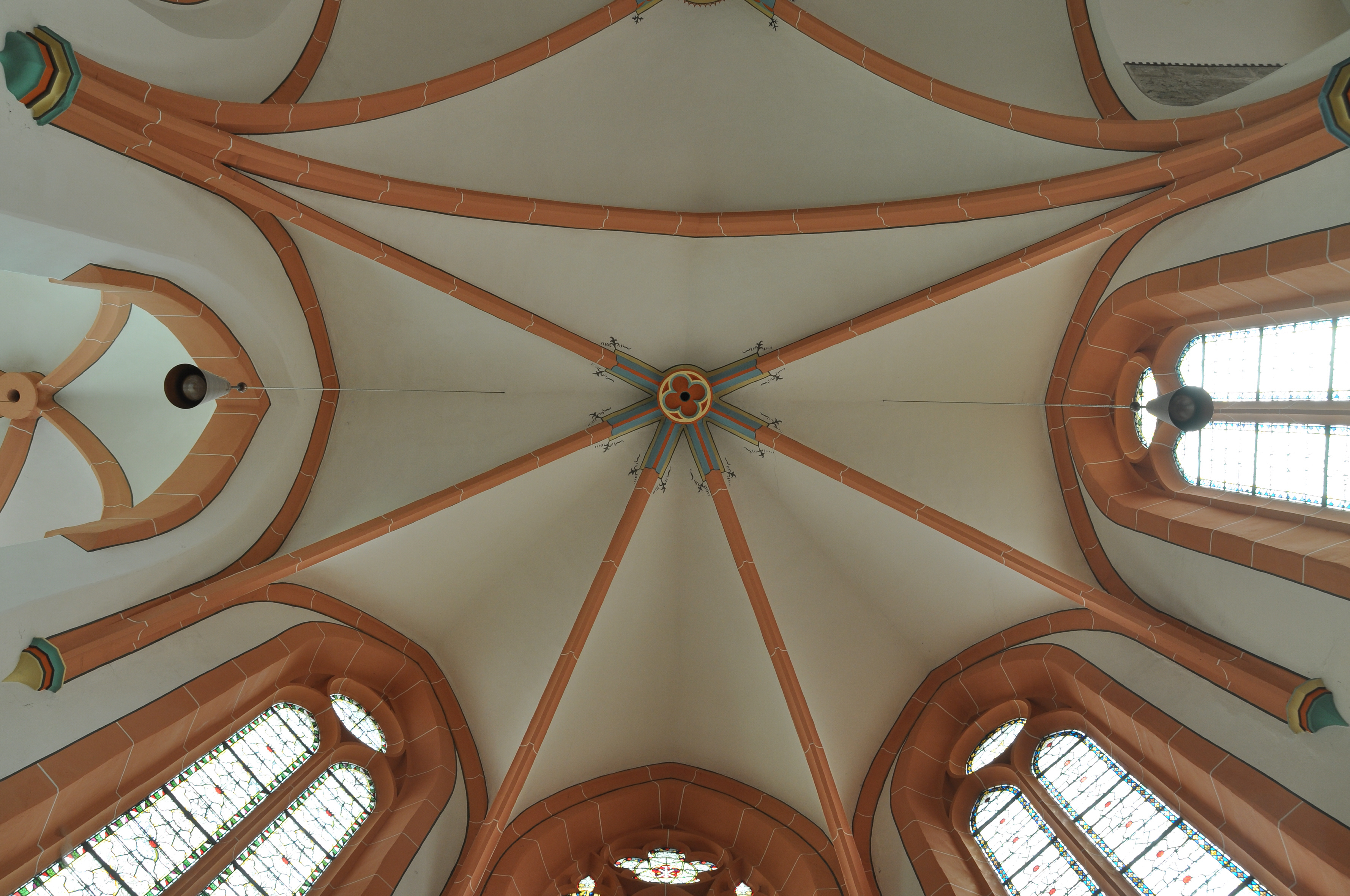 Gewölbe des Hauptchores